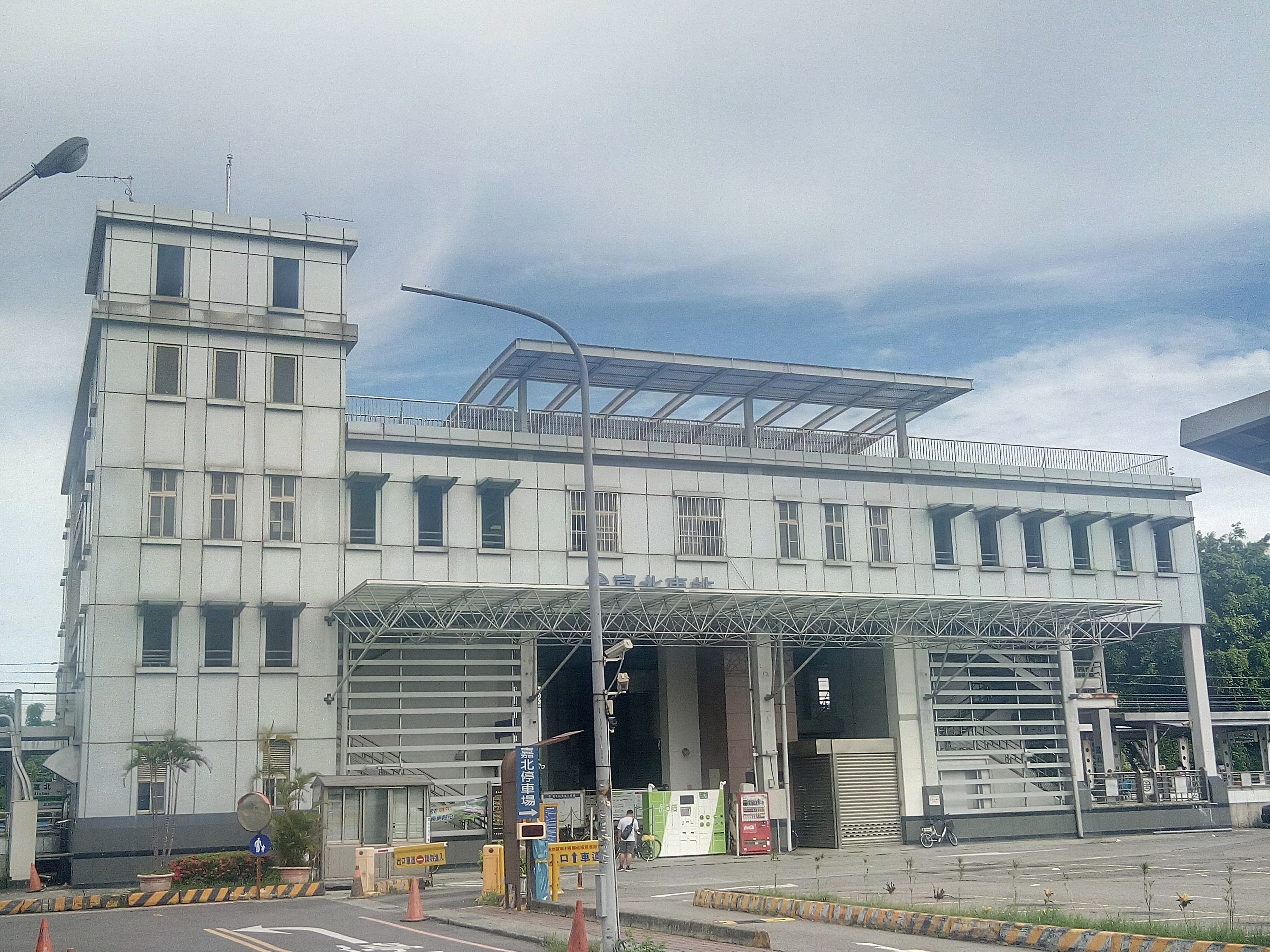 嘉北駅東口にて